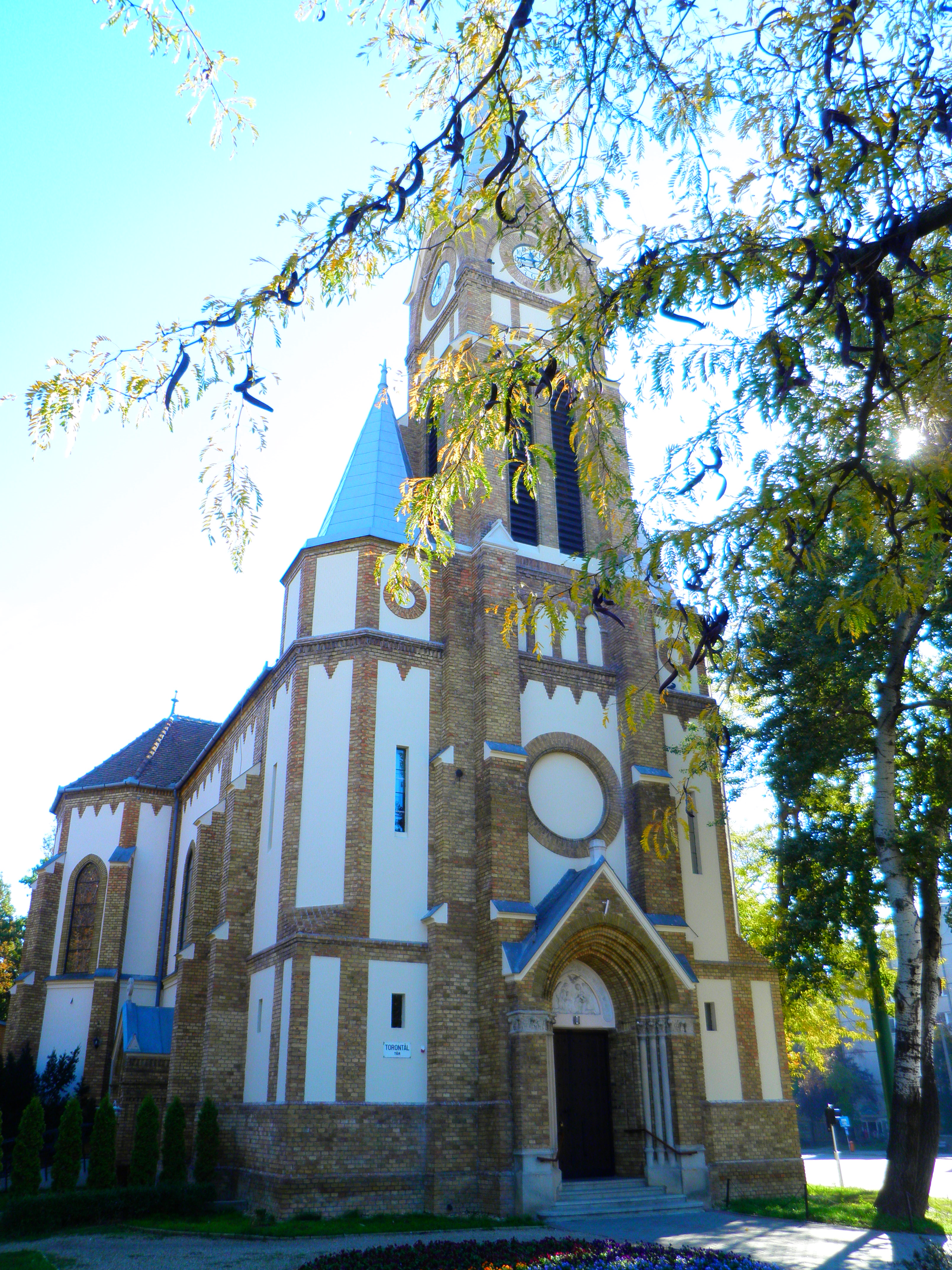 Sent Eržebet crkva